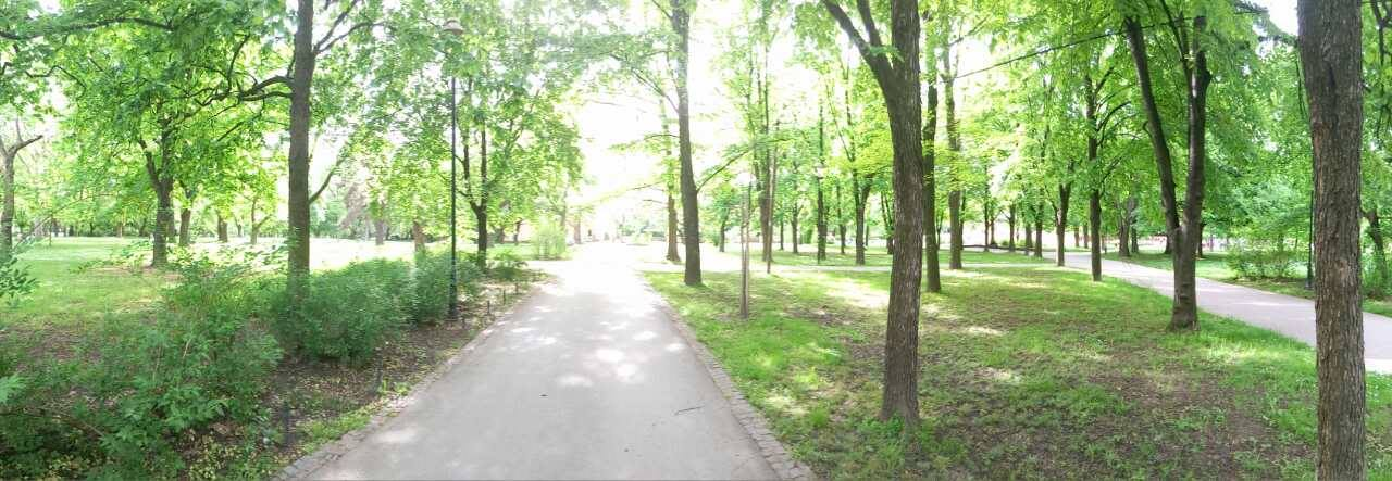 Српски (ћирилица): Футошки парк